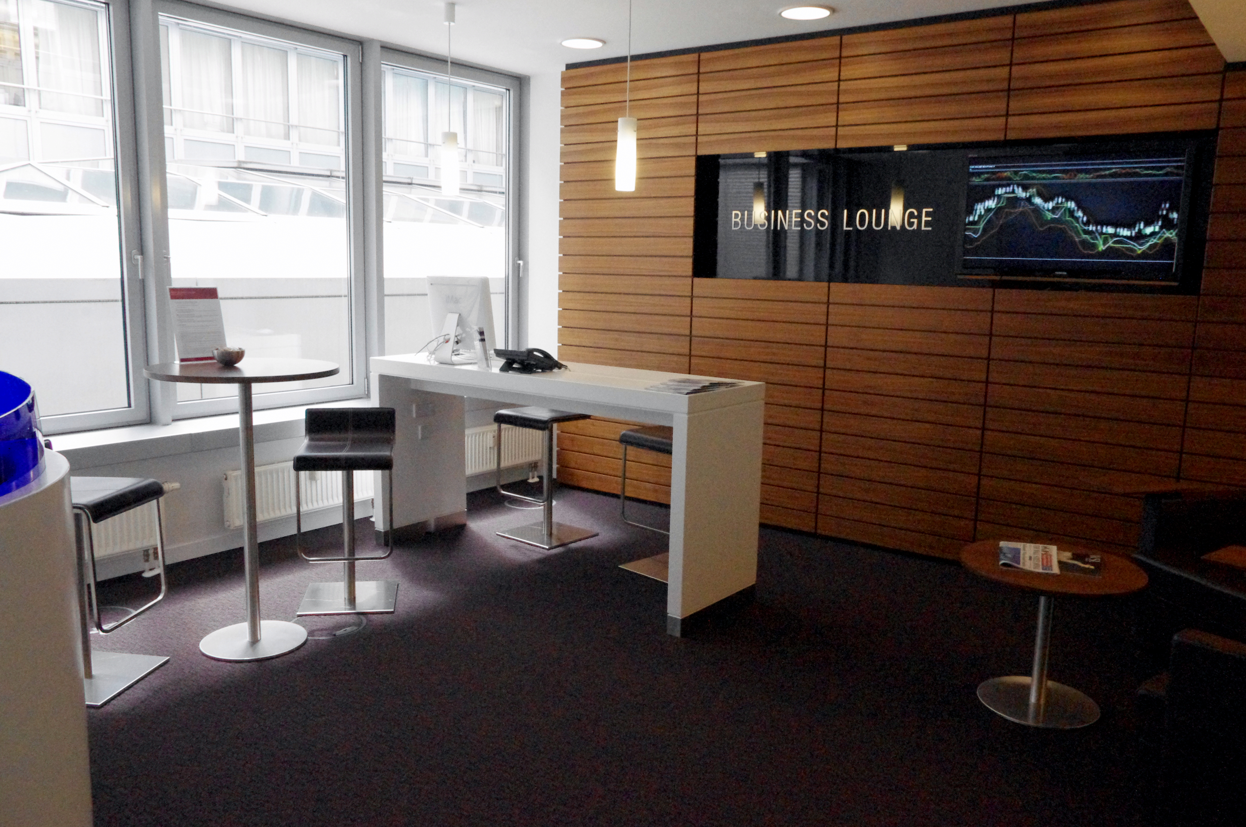 Regus Business Lounge Fridrichstr. Berlin